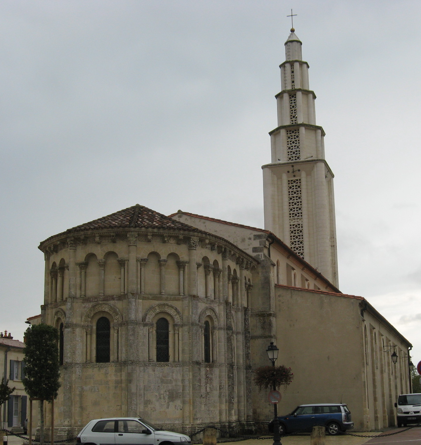 Abside 12e s démontée et remontée en 1880. Nef agrandie de bas-côtés et reconstruite en 1850.Tour-clocher construite entre 1955 et 1957 par l’architecte Larcher après les dommages de la seconde guerre mondiale. CMH 1862, ISMH 2008 .